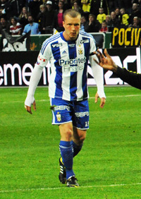 Jakob Johansson